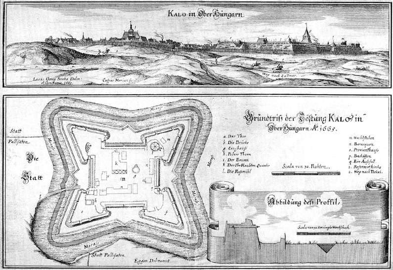 A kállói vár rézmetszete az 1600-as évekből